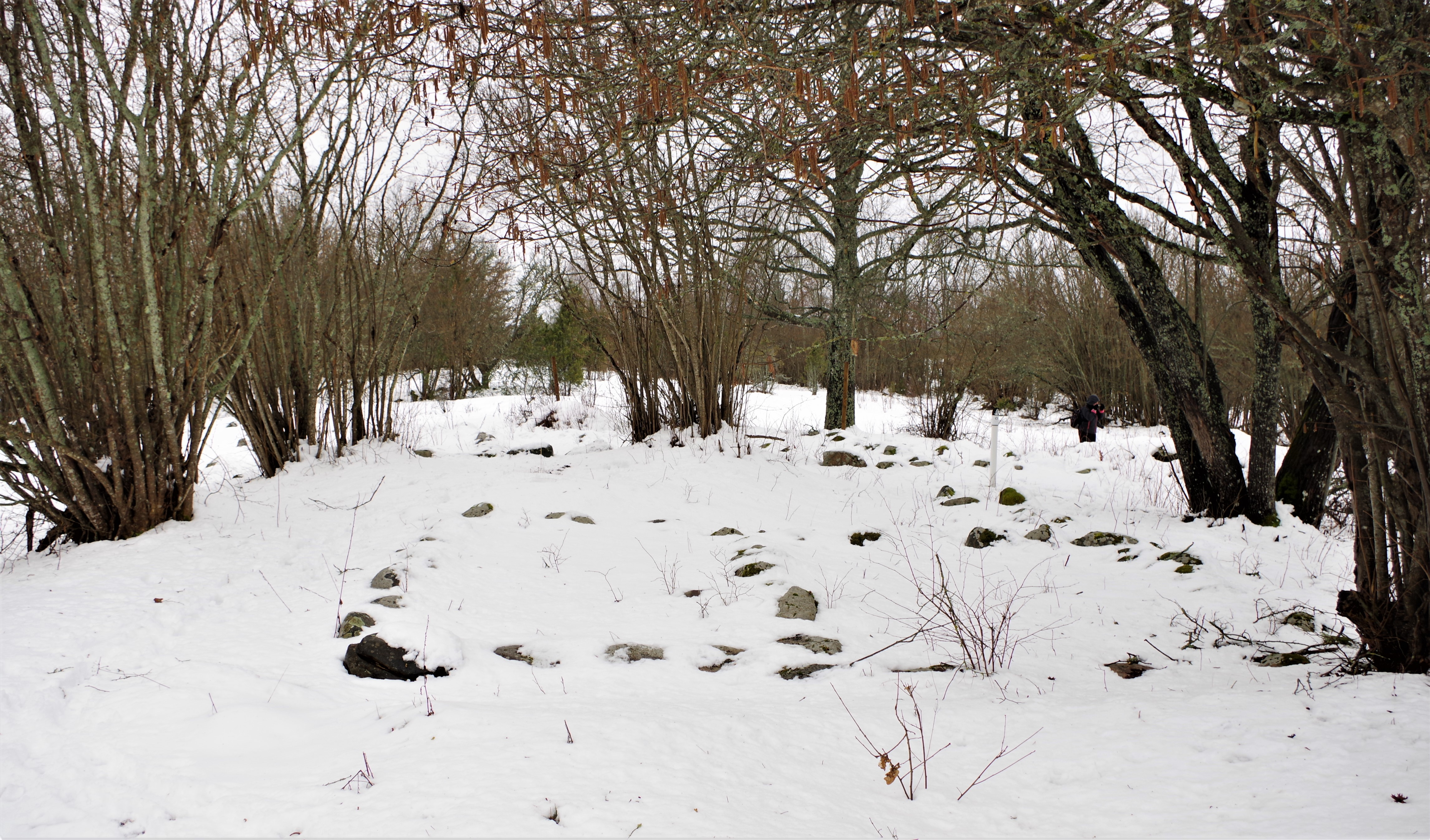 Poanse tarandkalmed (ka Poanse kalmistu) on kaks muitset tarandkalmet Pärnu maakonnas Lääneranna vallas Poanse külas.Kalmed on pärit I aastatuhande II poolest eKr.